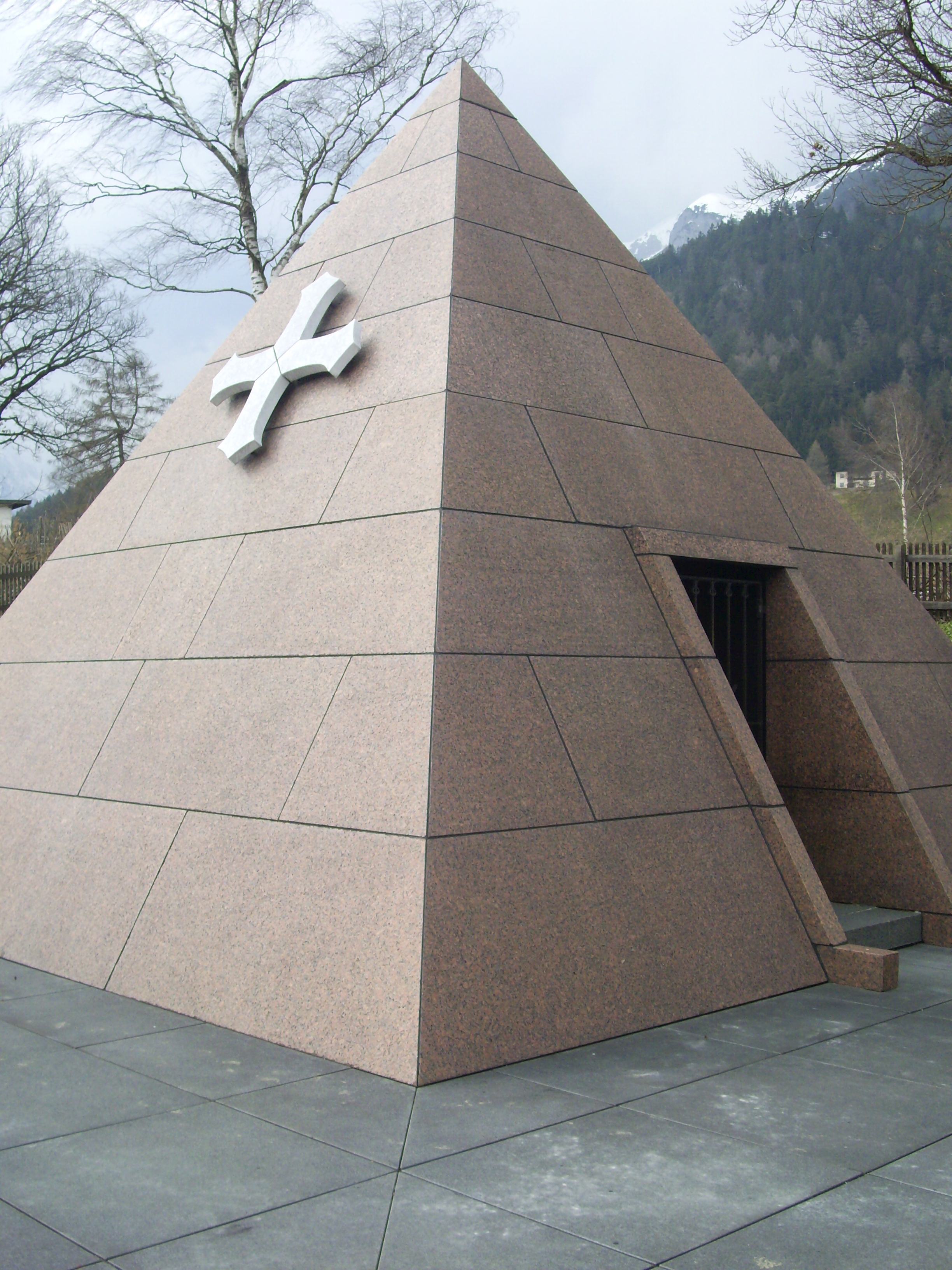 Grabmal von Oskar Ernst Bernhardt auf dem Vomperberg in Tirol This media shows the remarkable cultural object in the Austrian state of Tyrol listed by the Tyrolean Art Cadastre with the ID 14964. (on tirisMaps, pdf, more images on Commons, Wikidata)